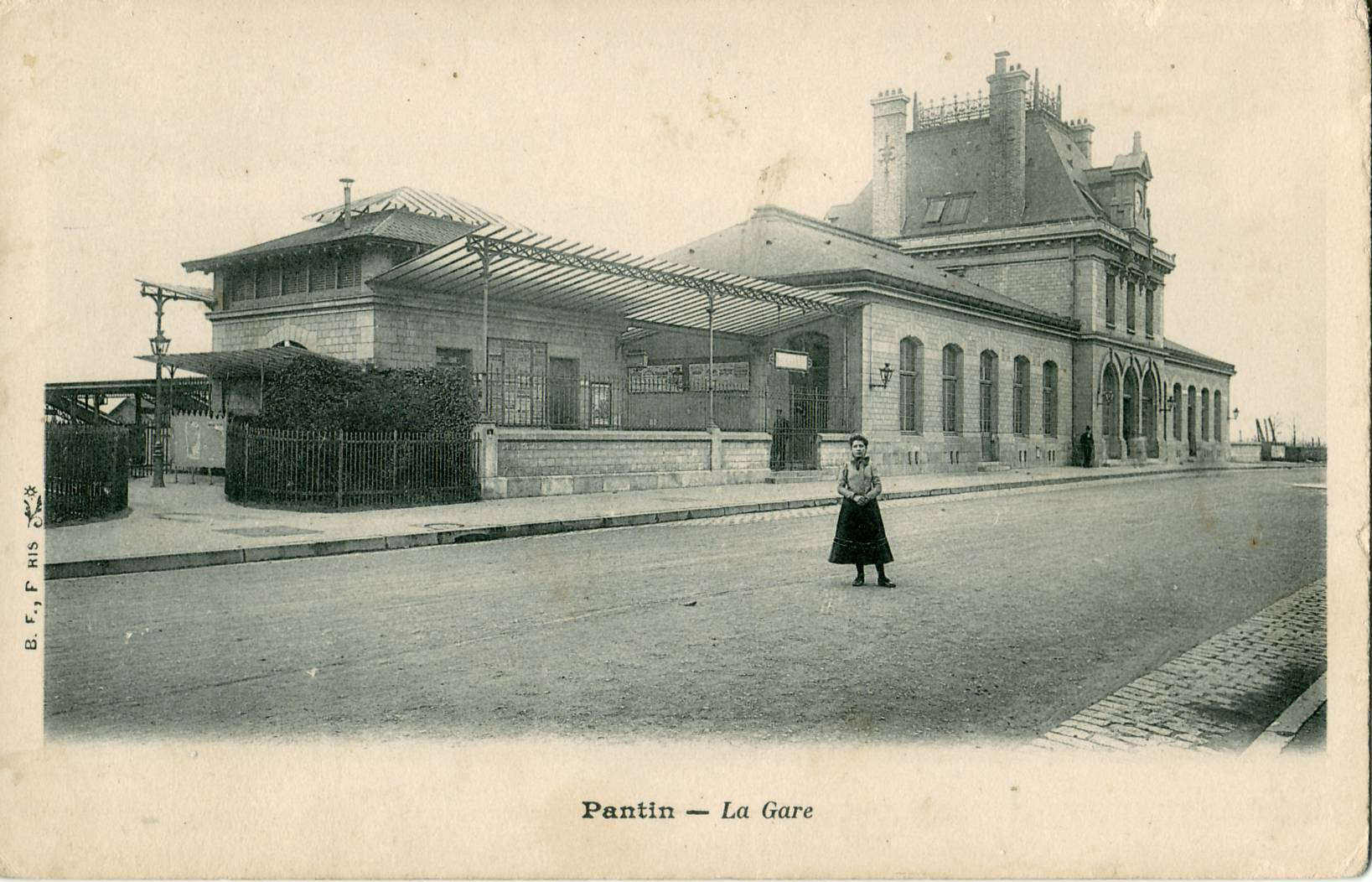 Carte postale ancienne éditée par BF à Paris PANTIN : la gare